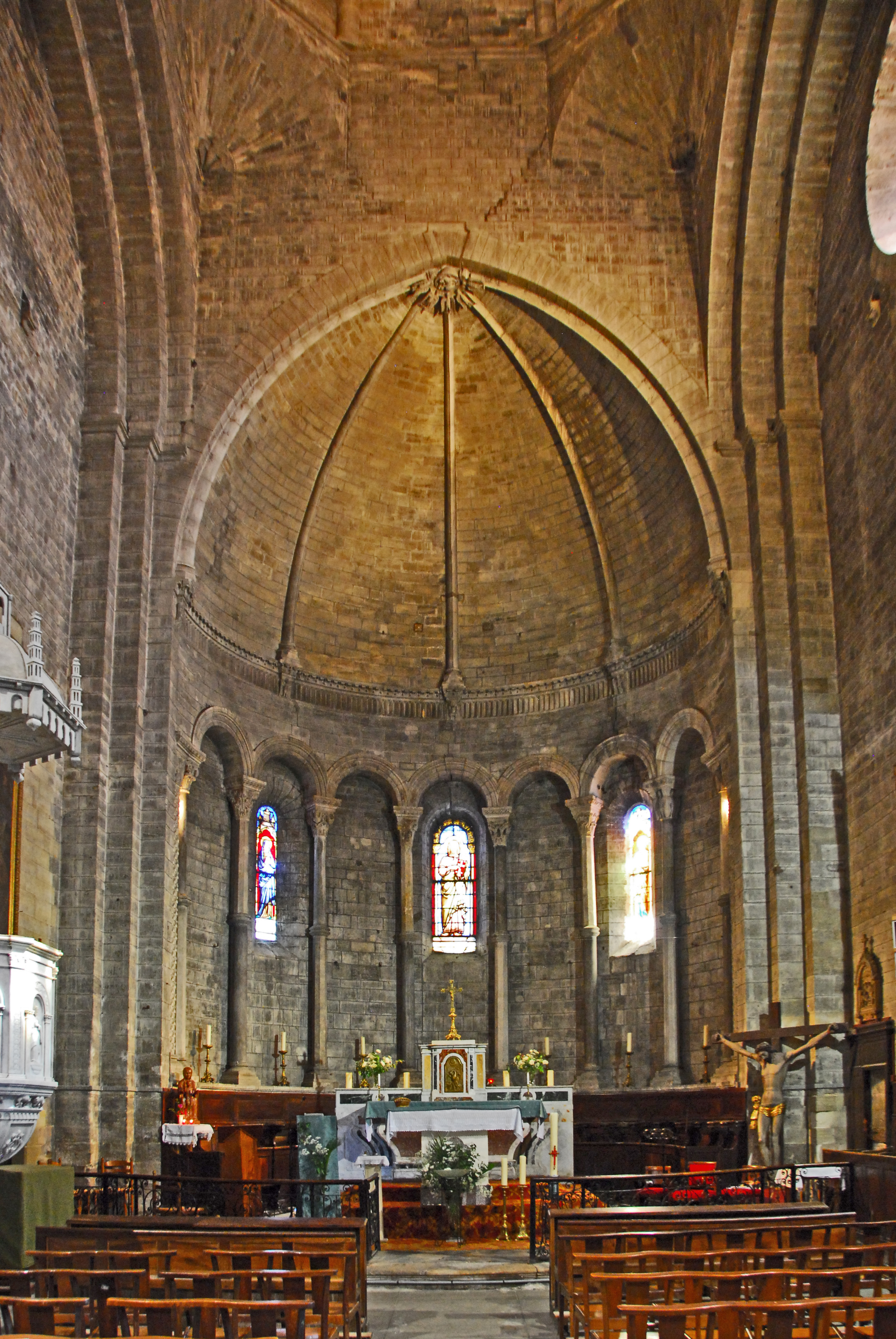 N-D-du-Lac du Le Thor, Chor aus Vierung